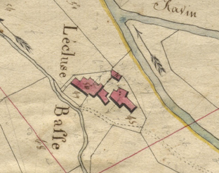 La Clusa d'Avall en el Cadastre napoleònic del 1812 (Arxius Departamentals dels Pirineus Orientals)